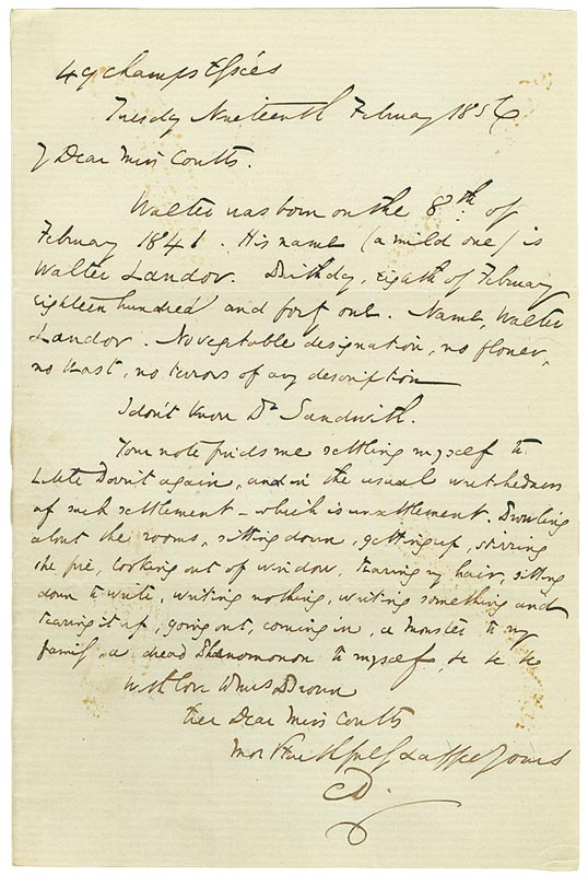 Lettre de Charles Dickens à Angela Burdett-Coutts (19/2/1856)